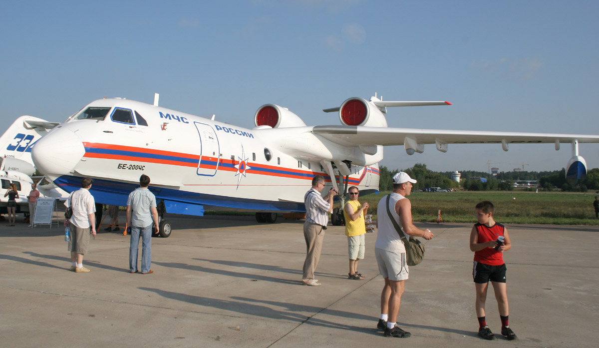 Самолёт Бе-200. Экспозиция на МАКС-2007